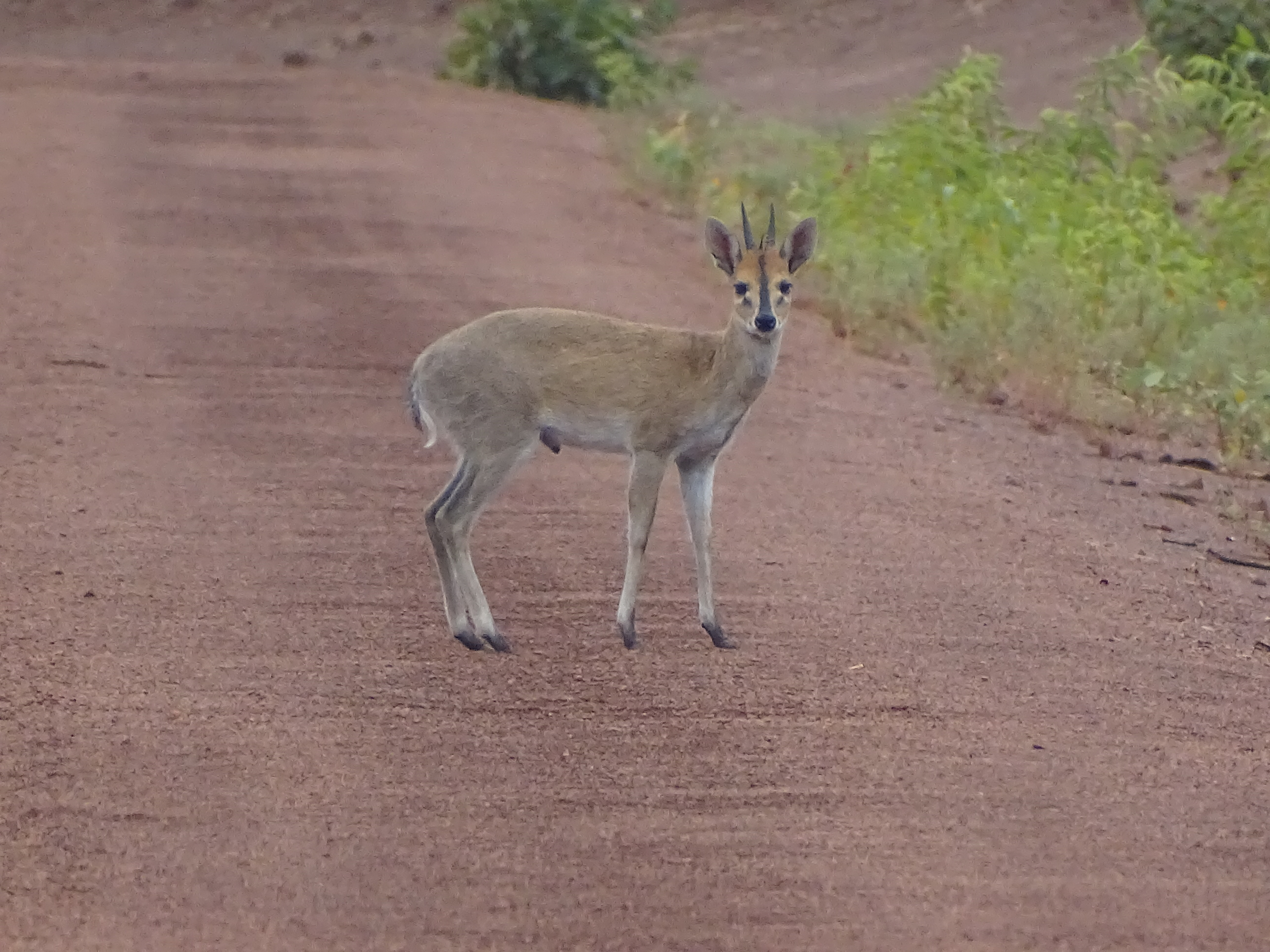 Cette photo à été prise dans le Parc national de la pendjari